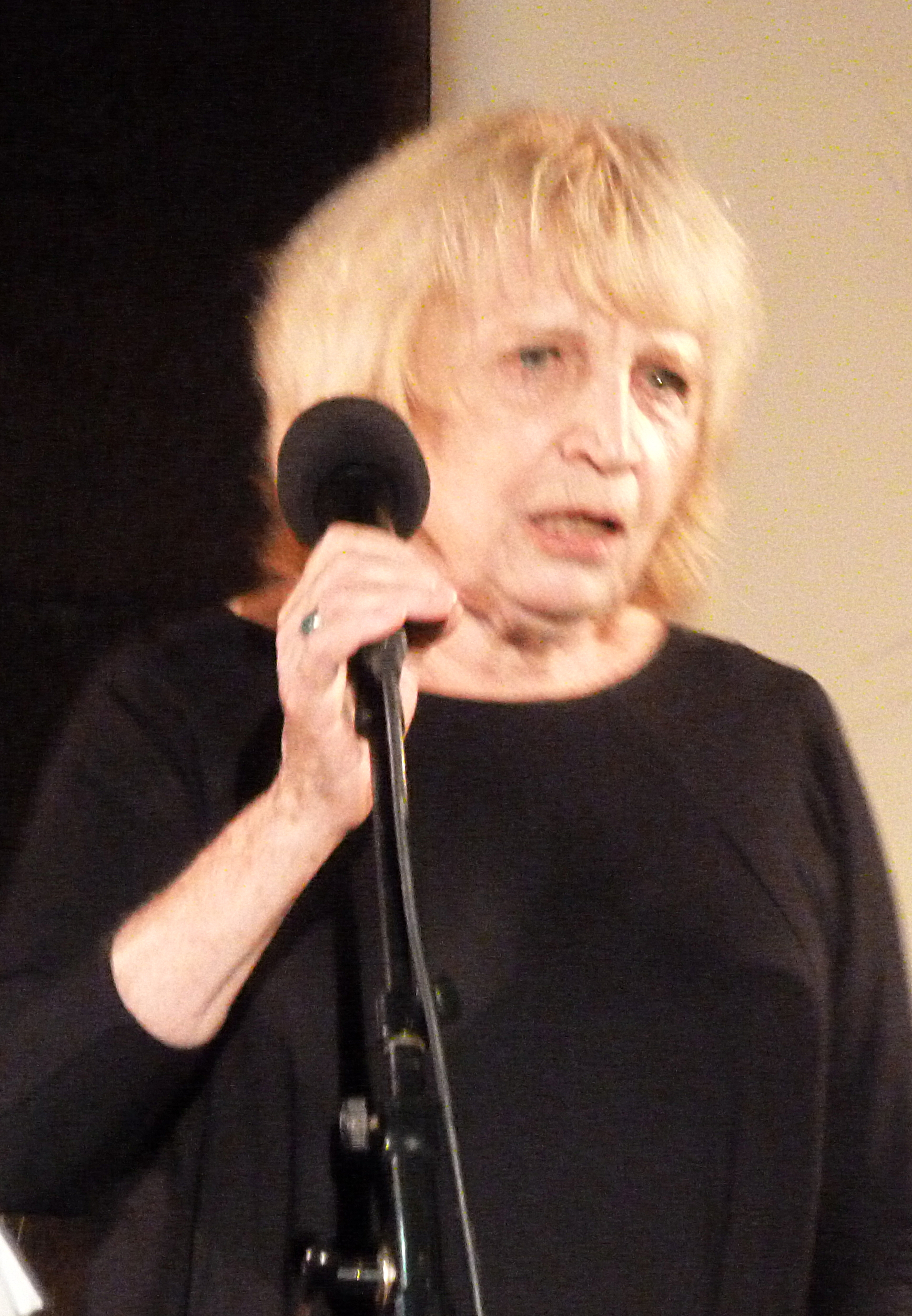 Fête des Ami(es) de la Commune de Paris 1871 à Clermont-Ferrand (dimanche 27 septembre 2015) - Spectacle "Ferrat au coeur"